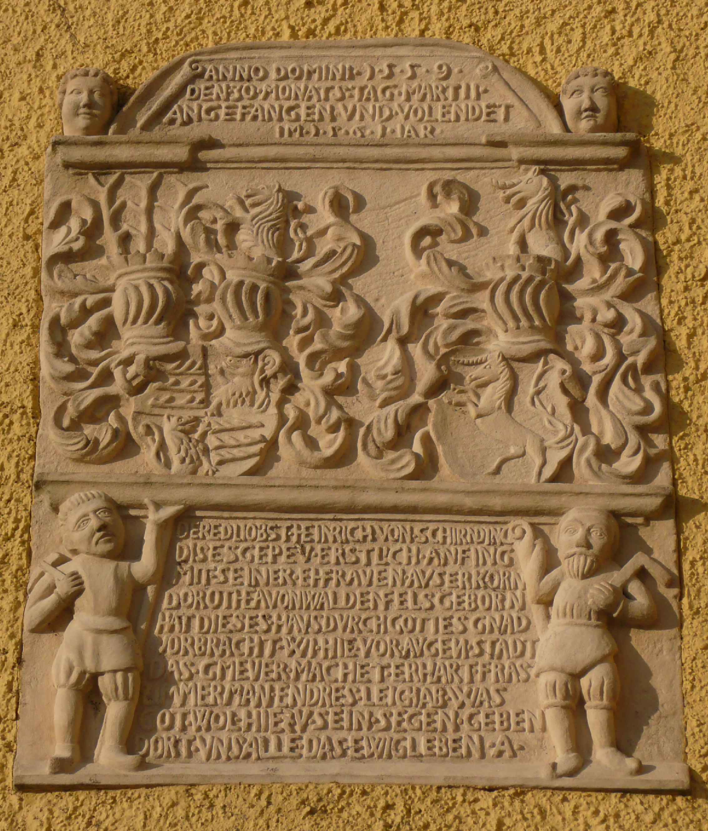 Schloss Röthenbach - Wappentafel mit dem Allianzwappen Schirnding/Waldenfels und der Bauinschrift aus dem Jahr 1559